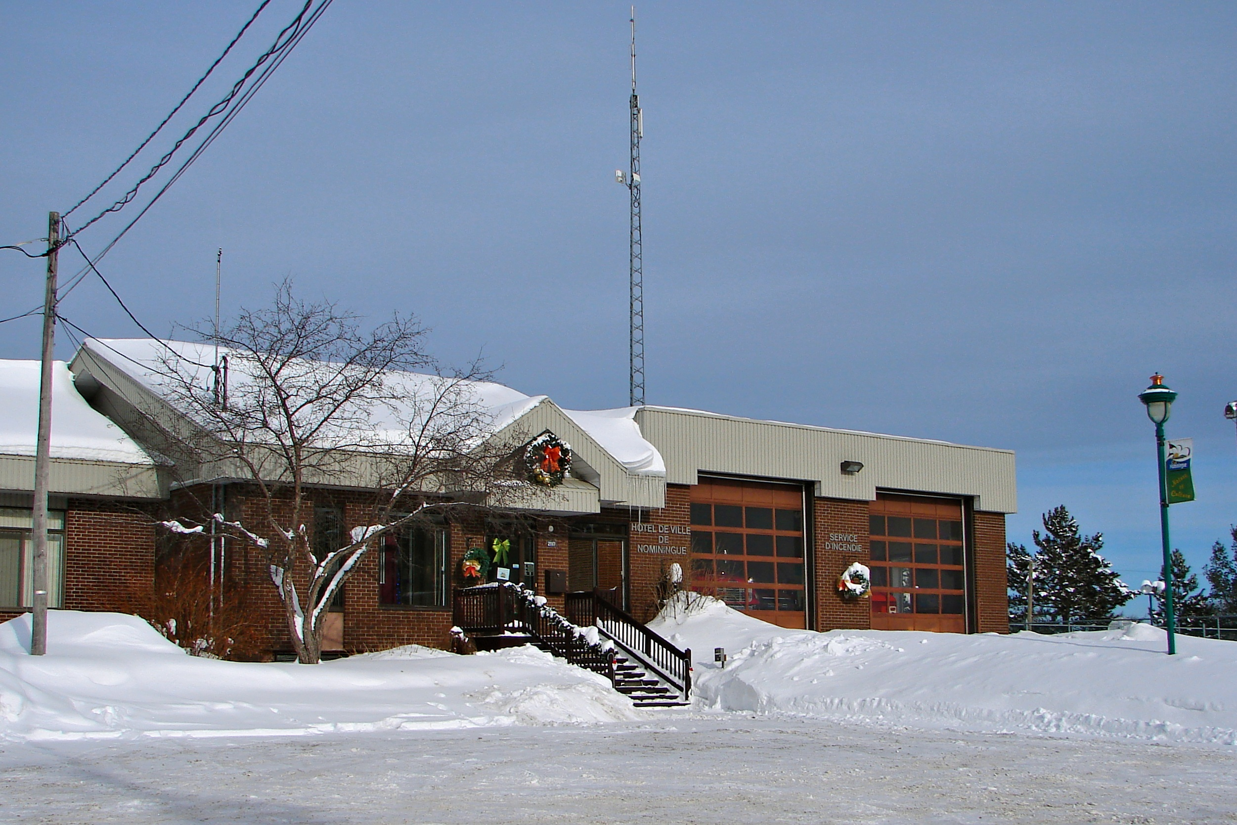 Nominingue, Quebec, Canada